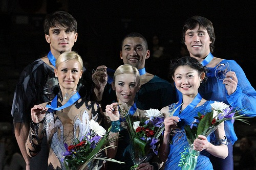 Подиум в парном катании в финале Гран-при по фигурному катанию сезона 2011-2012. Слева на право: Татьяна Волосожар / Максим Траньков (2-е место), Алёна Савченко / Робин Шолковы (1 место), Юко Кавагути / Александр Смирнов (3-е место)